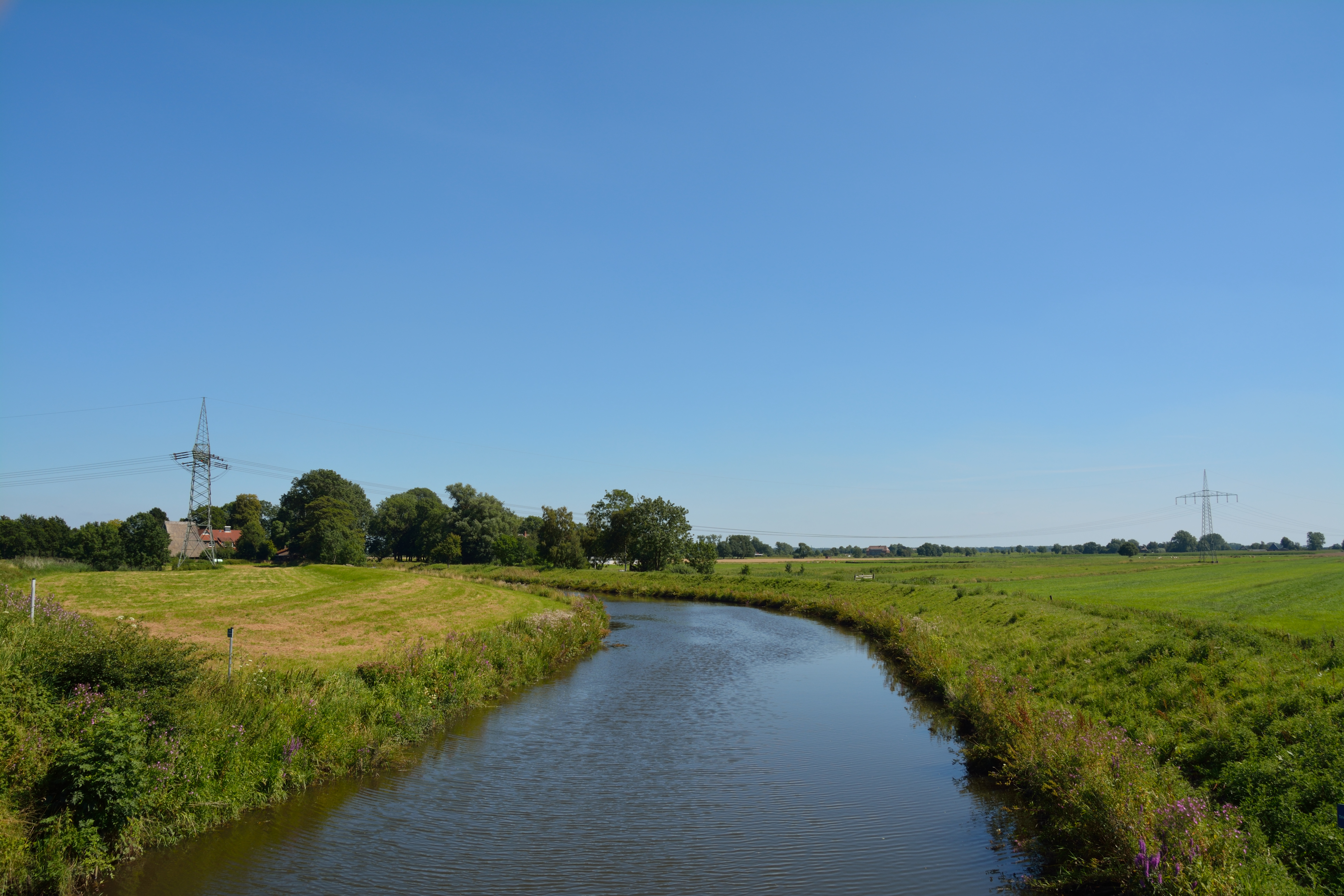 Die Bekau in Bekmünde